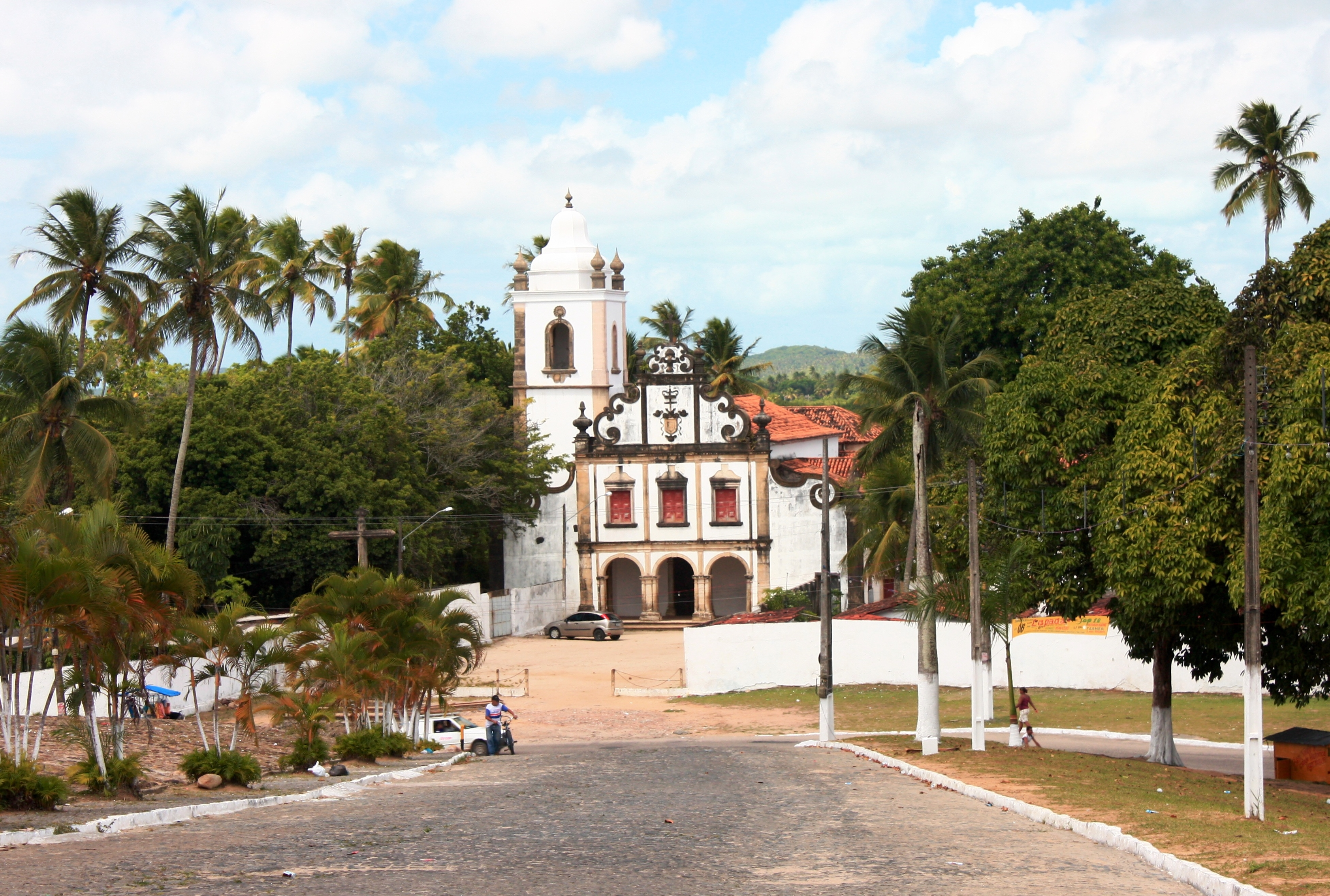 Português do Brasil: Igreja e Convento de Santo Antônio - Igarassu, Pernambuco, Brasil